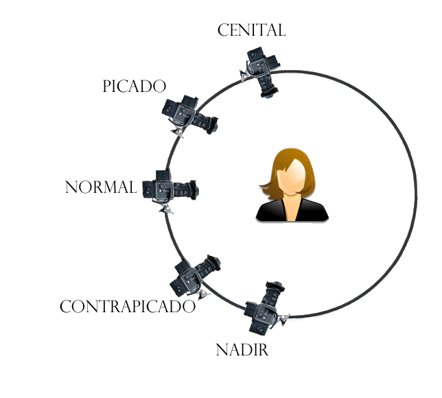 Esquema sobre los distintos tipos de ángulos en un plano visual. Ejemplo cinematográfico. Incluye imagenes de otros archivos de wikicommons (file:Hasselblad 503CW V96C.jpg y file:Crystal Clear kdm user female.png